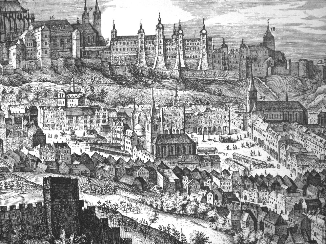 Malostranské náměstí r. 1606.